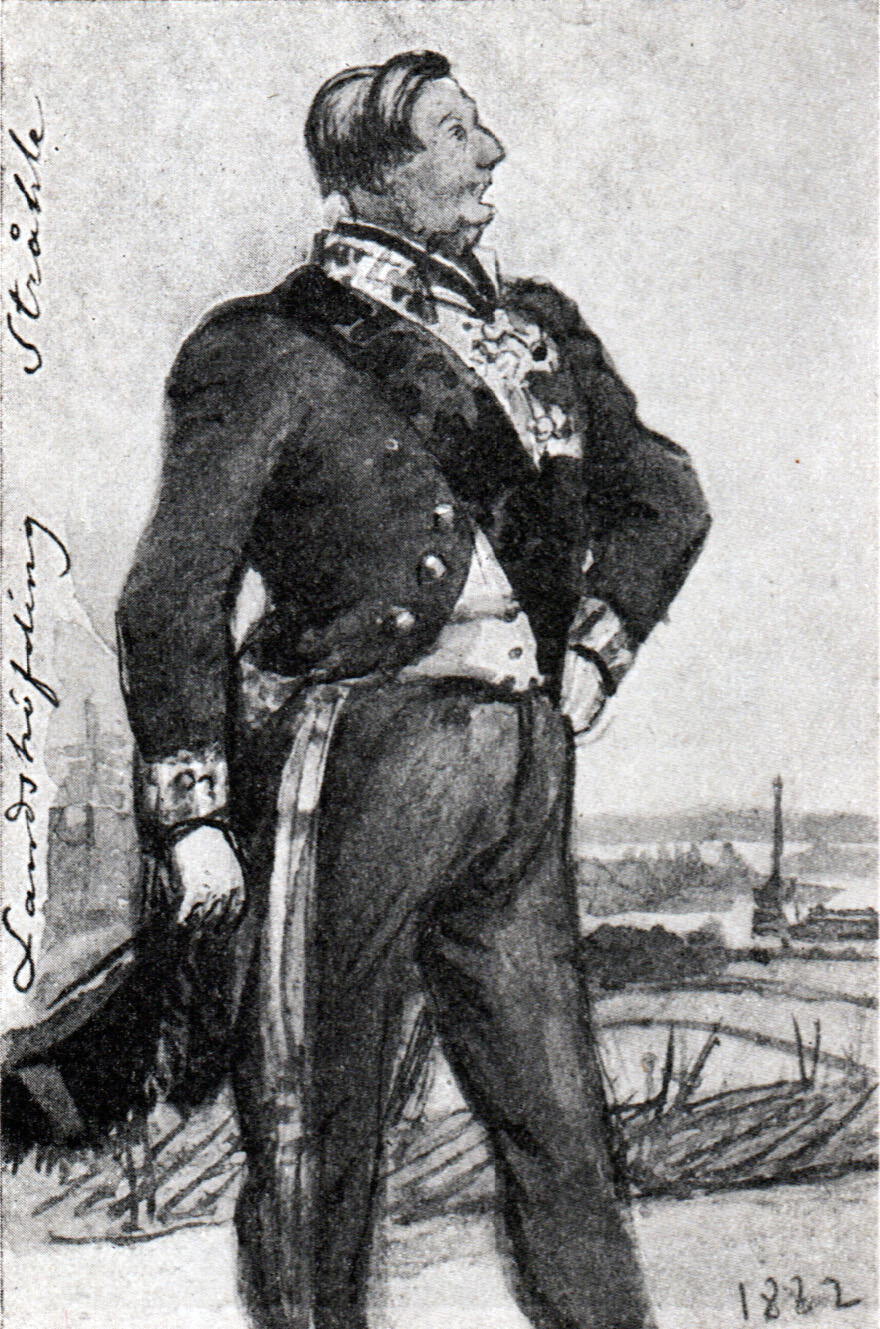 Wilhelm Stråle af Ekna (1816-1902)